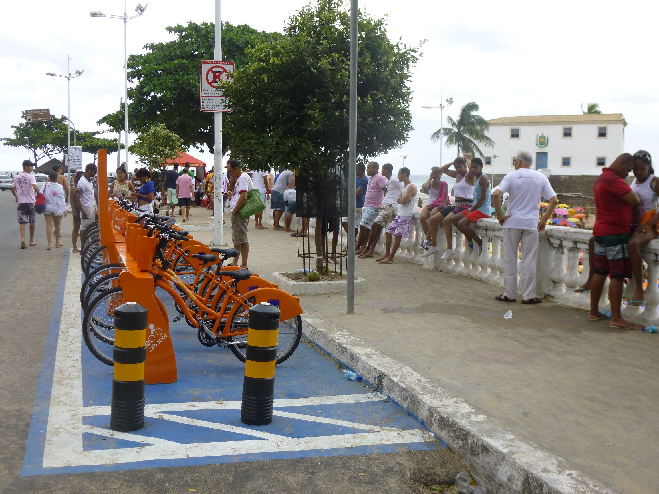 Fahrradstation an der Barra, Salvador/Bahia